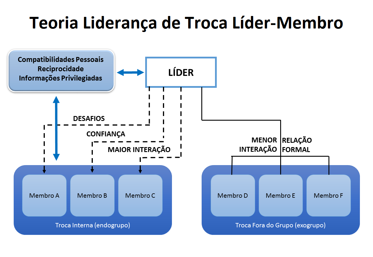 Teoria LMX